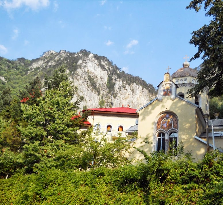 Monument istoric, sec XIX.